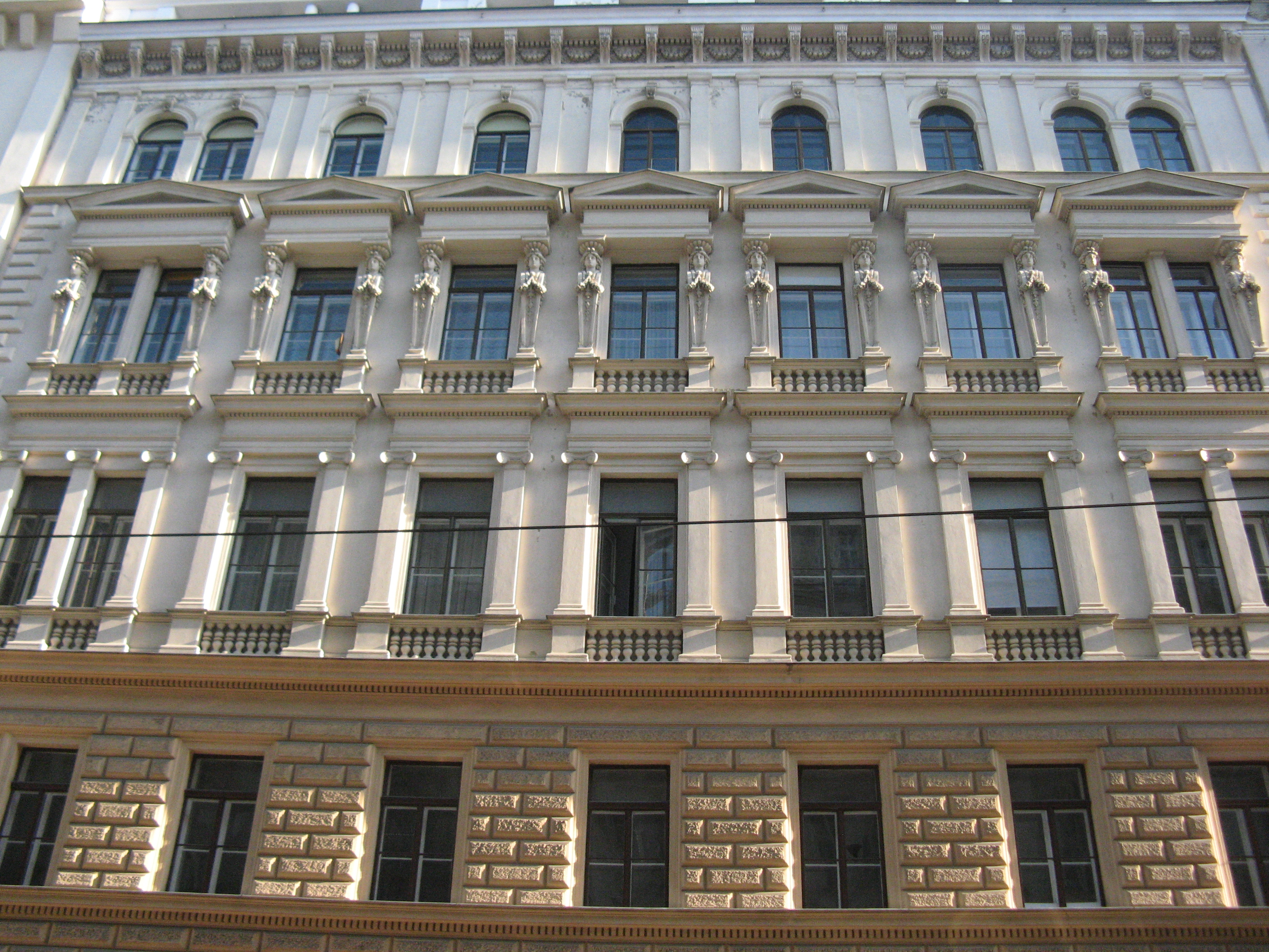 Haus Esslinggasse 18, Wien-Innere Stadt